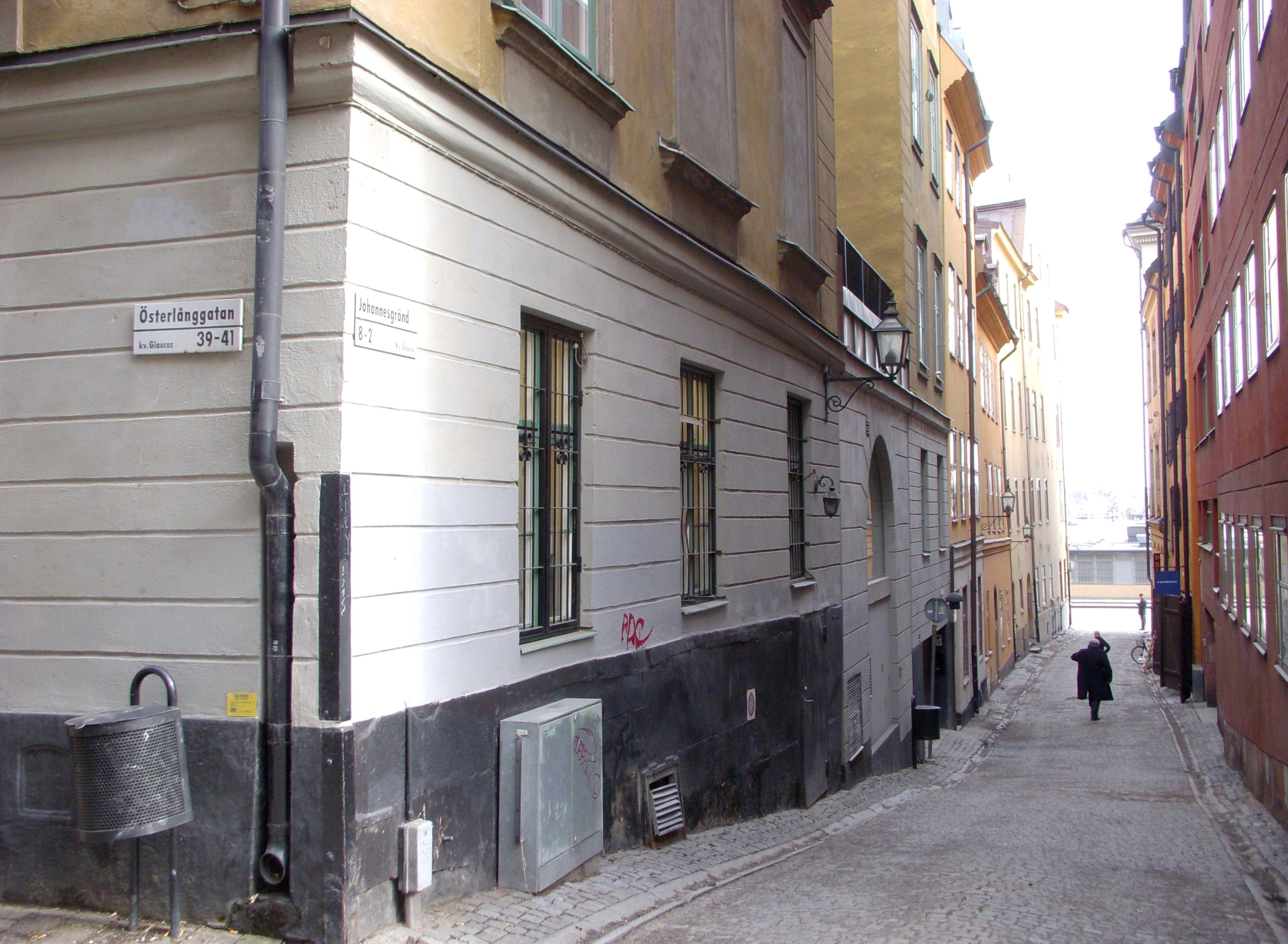 Kvarteret Glaucus, Johannesgränd, Gamla stan, platsen för S:t Johanneskyrkan